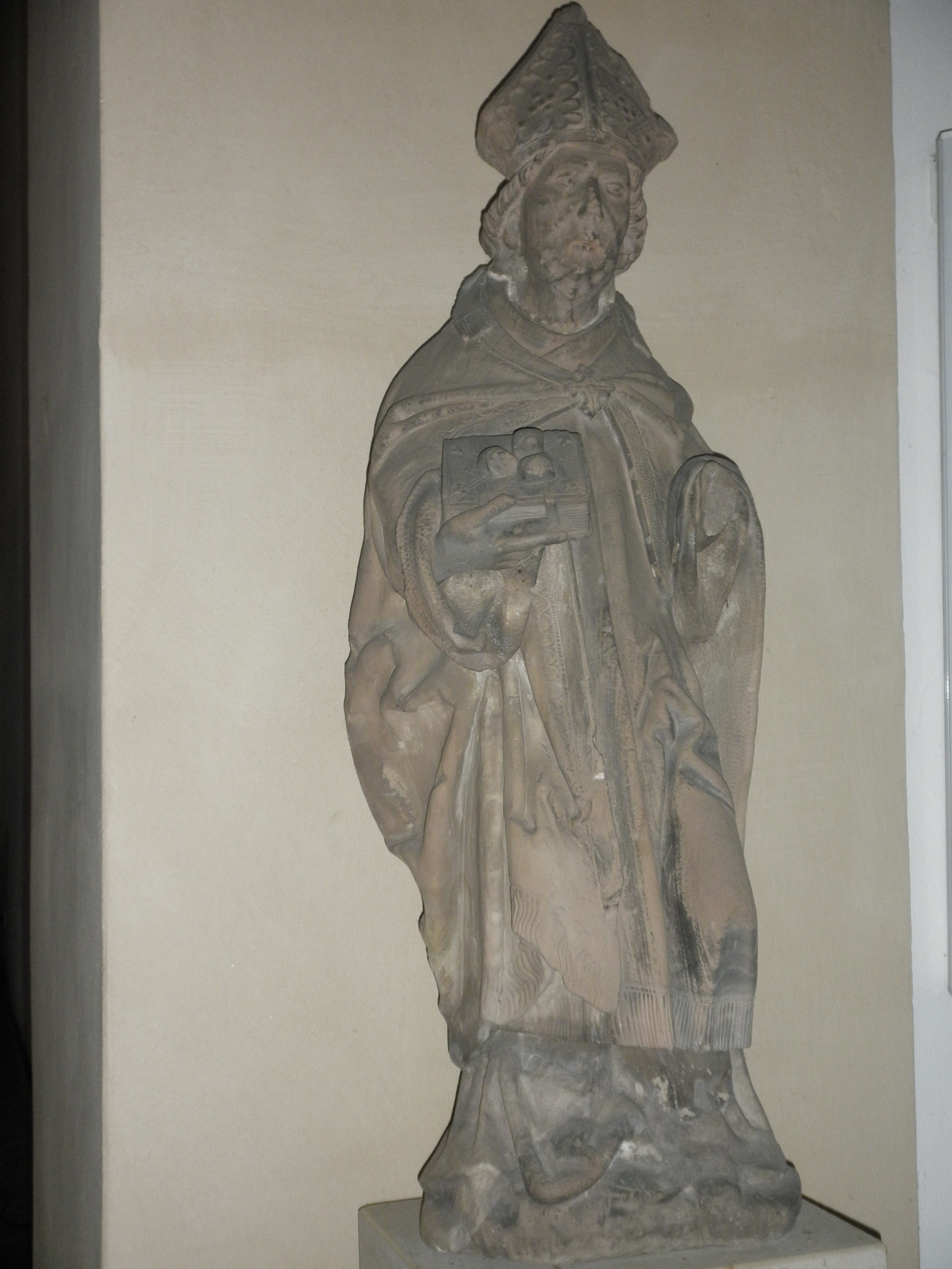 St.Nikolaus im Kircheninneren